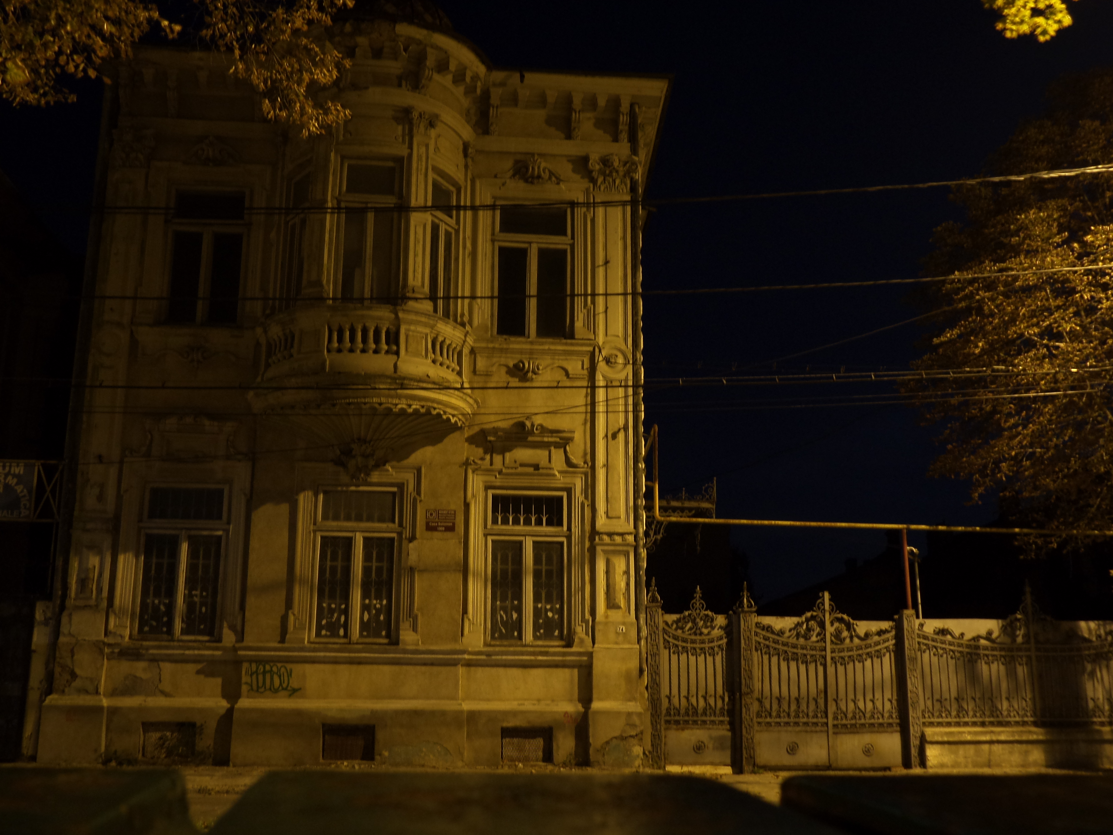 Casa Solomon vazuta noaptea